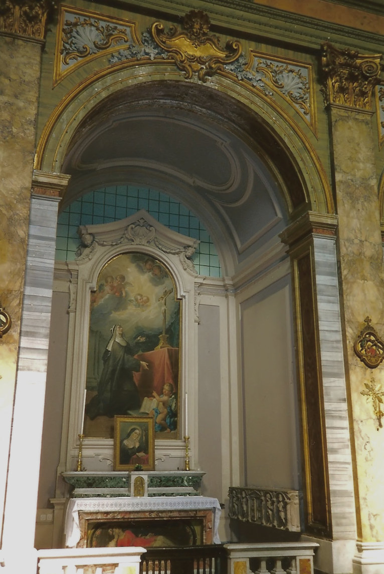 Chiesa di San Lorenzo in Panisperna, Cappella di Santa Brigida